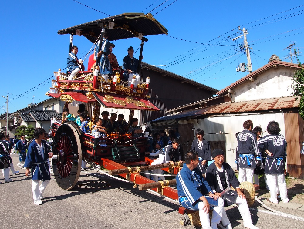 瀬波大祭 上町